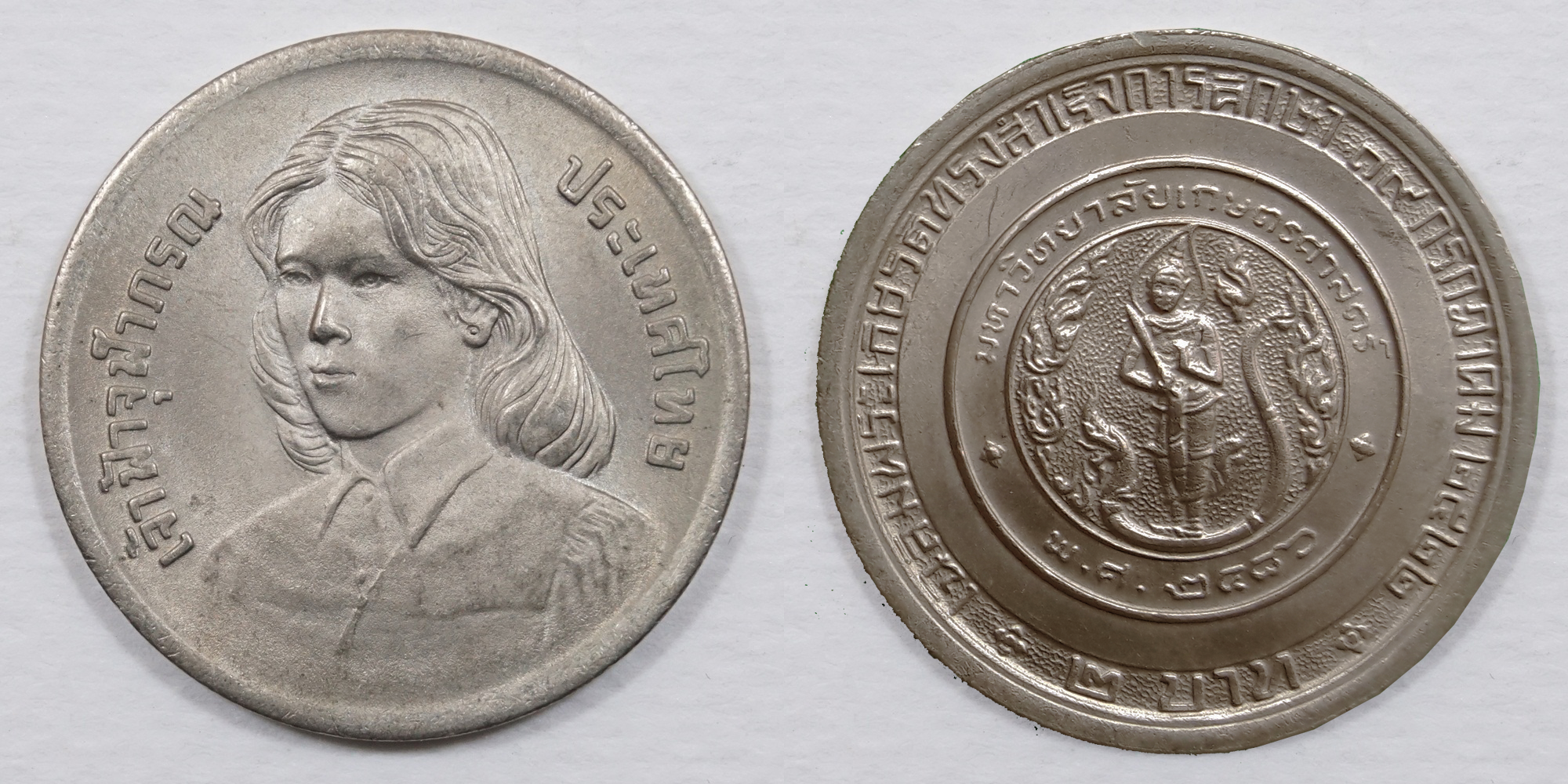 เหรียญกษาปณ์ สมเด็จเจ้าฟ้าจุฬาภรณฯ ทรงสำเร็จการศึกษาจากมหาวิทยาลัยเกษตรศาสตร์